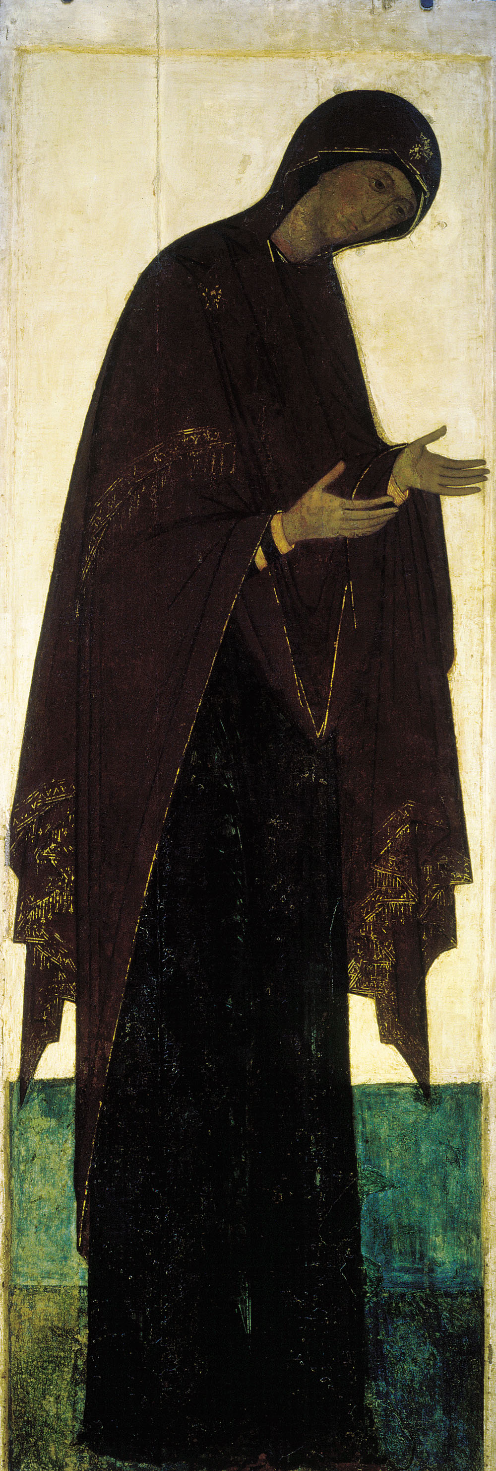 Богоматерь Из деисусного чина Рублев Андрей с помощниками Школа или худ. центр: Москва 1408 г. 313 × 106 см Государственная Третьяковская галерея, Москва, Россия Инв. 22125 Из деисусного чина Успенского собора во Владимире